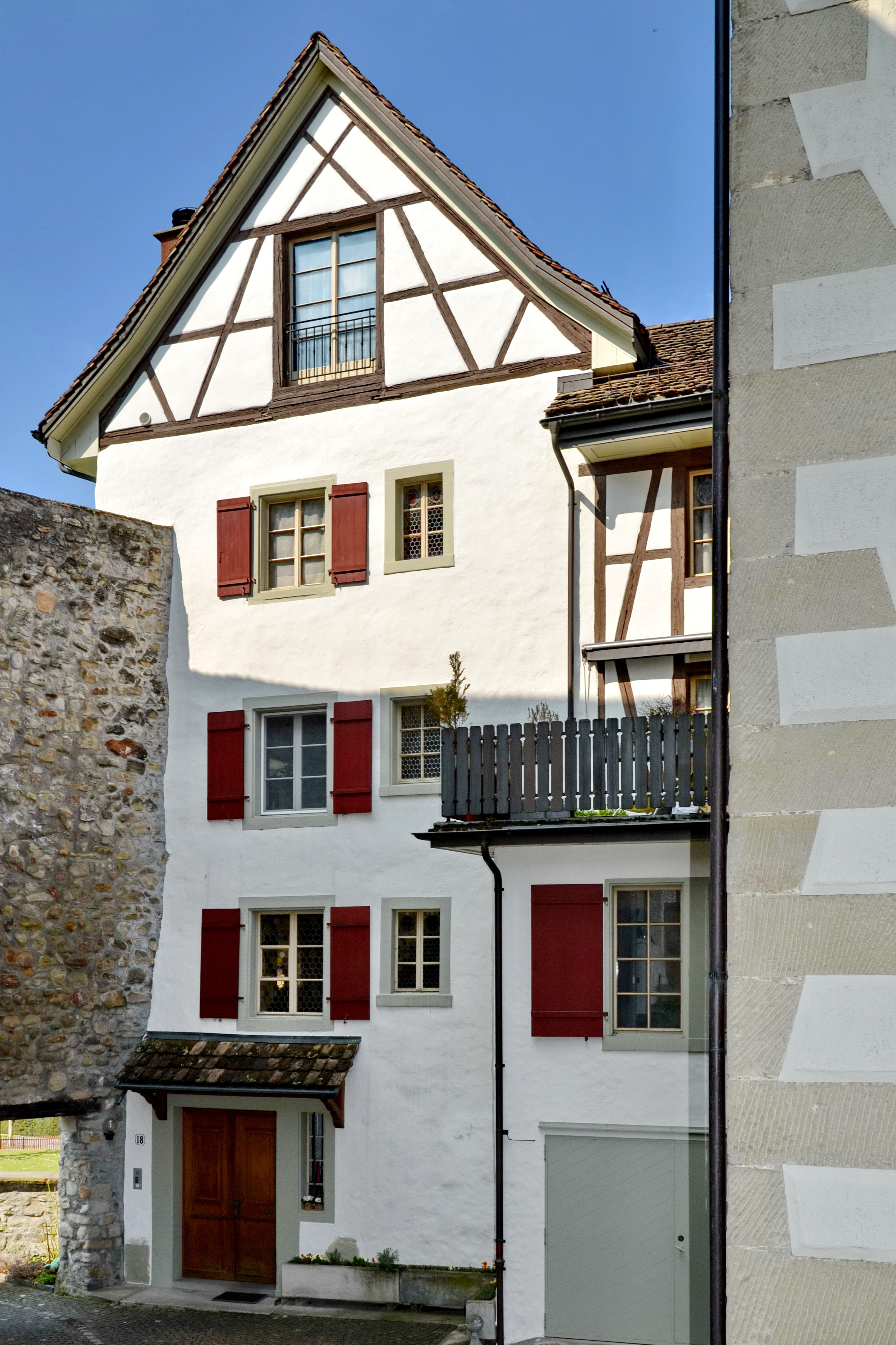 Müseggturm, Engelplatz in Rapperswil (Switzerland)